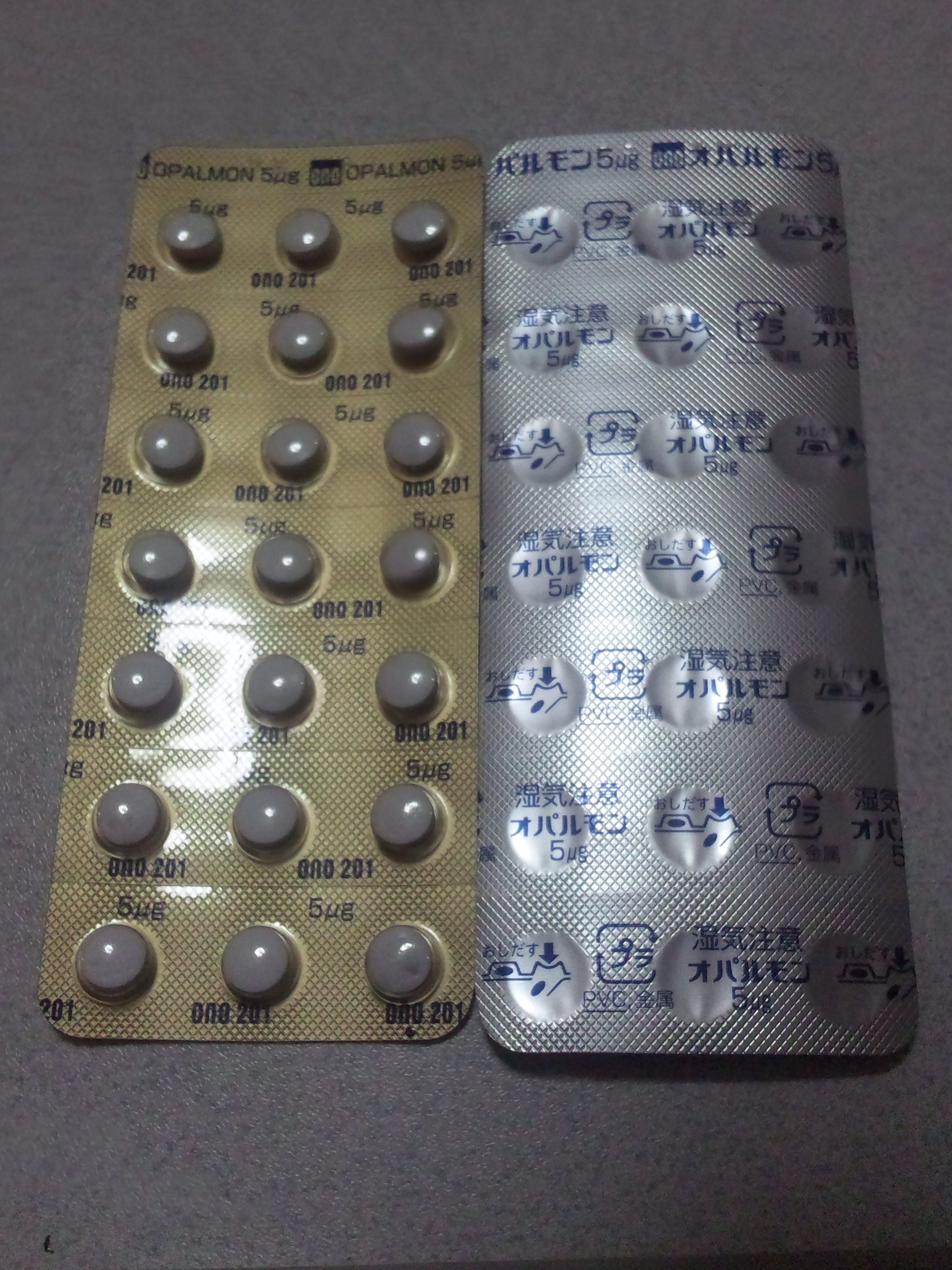 オパルモン錠5μｇ